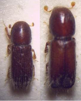 Xylocleptes_bispinus_Weibchen und_Männchen_von_oben_20fach_Imago